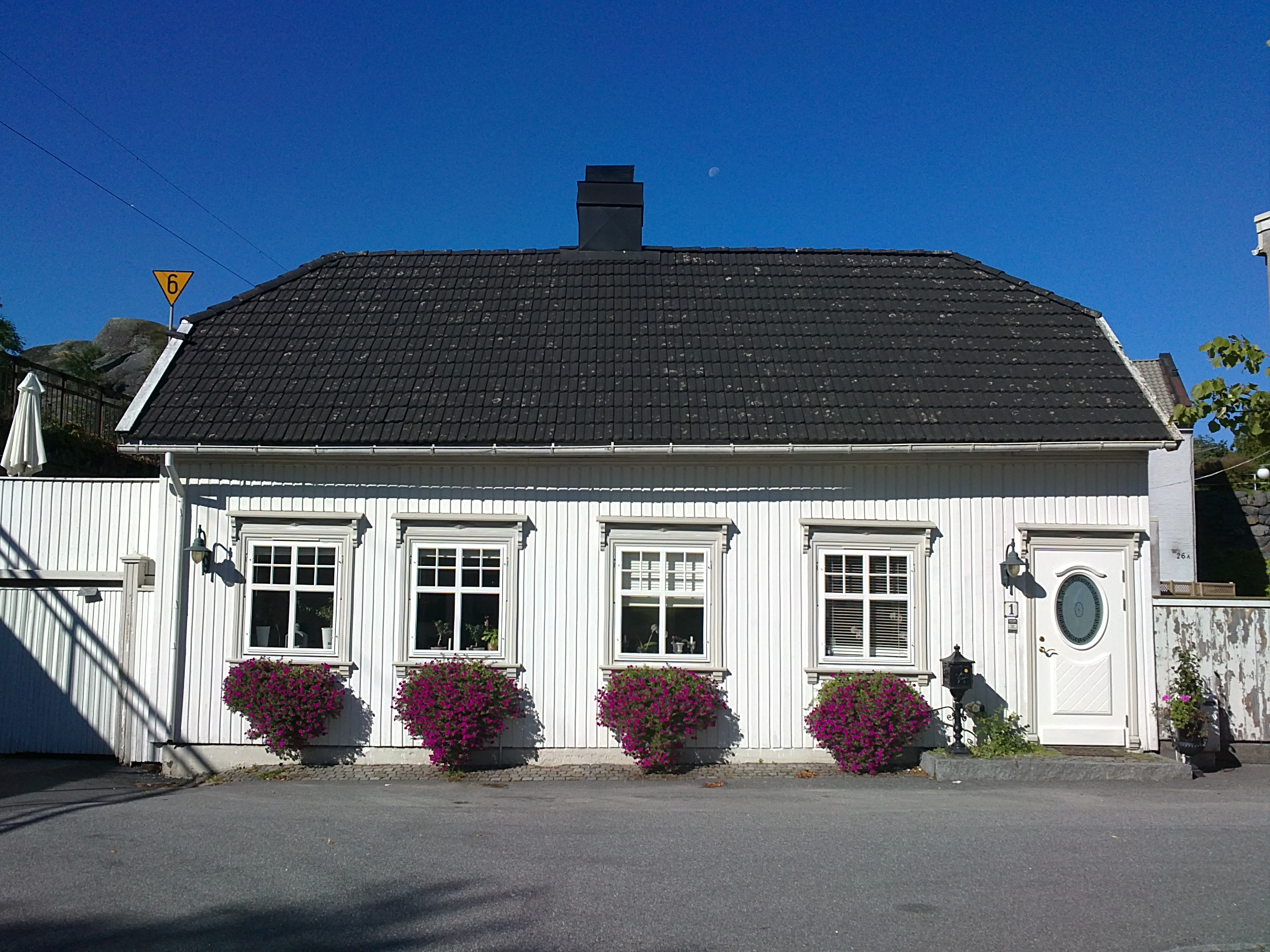 Bilde av Torstrand torg 1